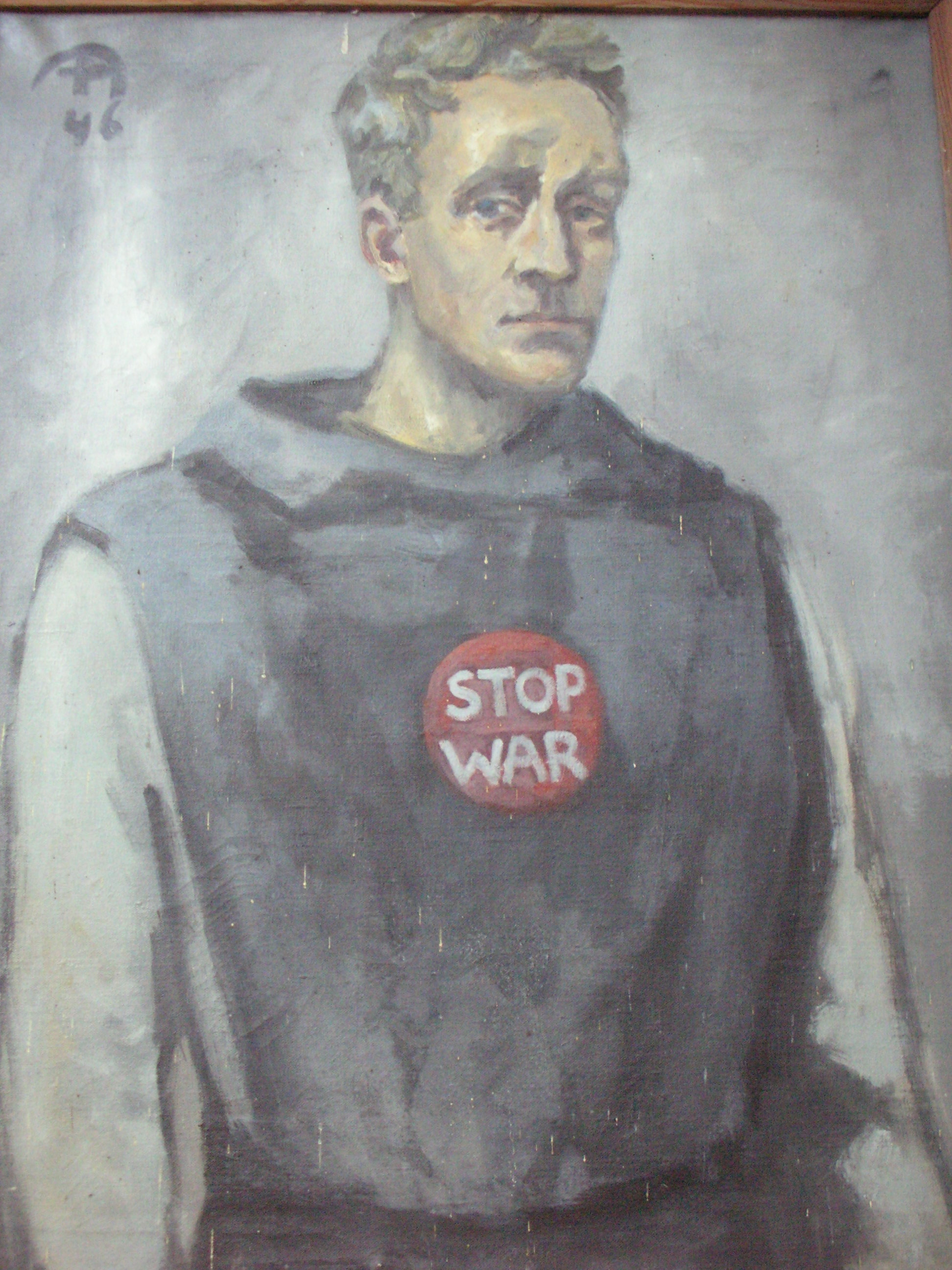 Antoine ALLARD, Autoportrait, 1947, conservé au Regenboog, Heyst-sur-Mer, Belgique